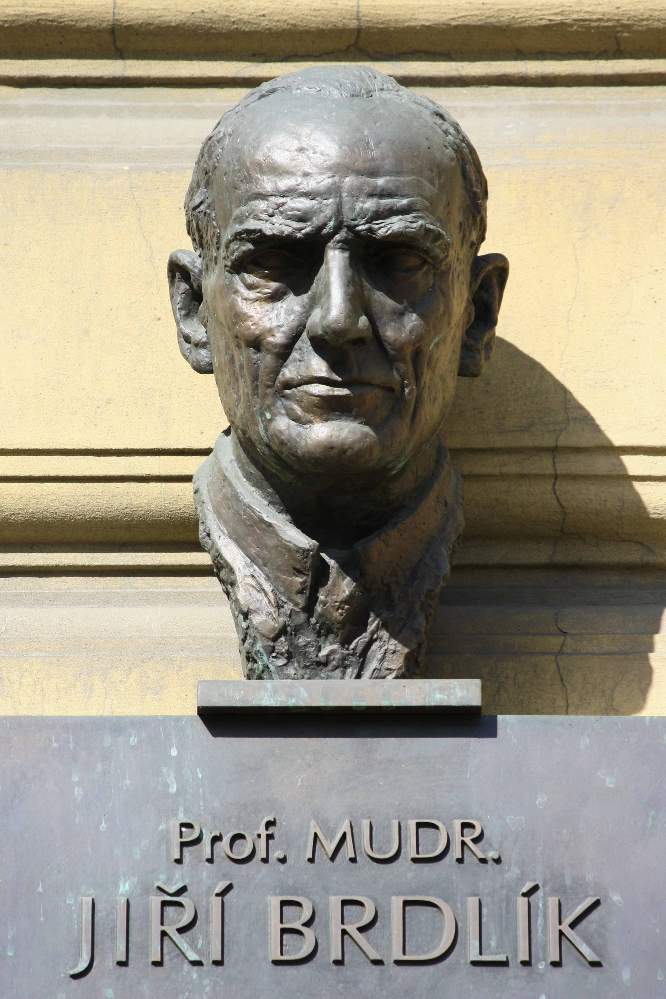 Jiří Brdlík - pamětní deska s bustou (Vítězná 2/558, Praha 1 - Malá Strana